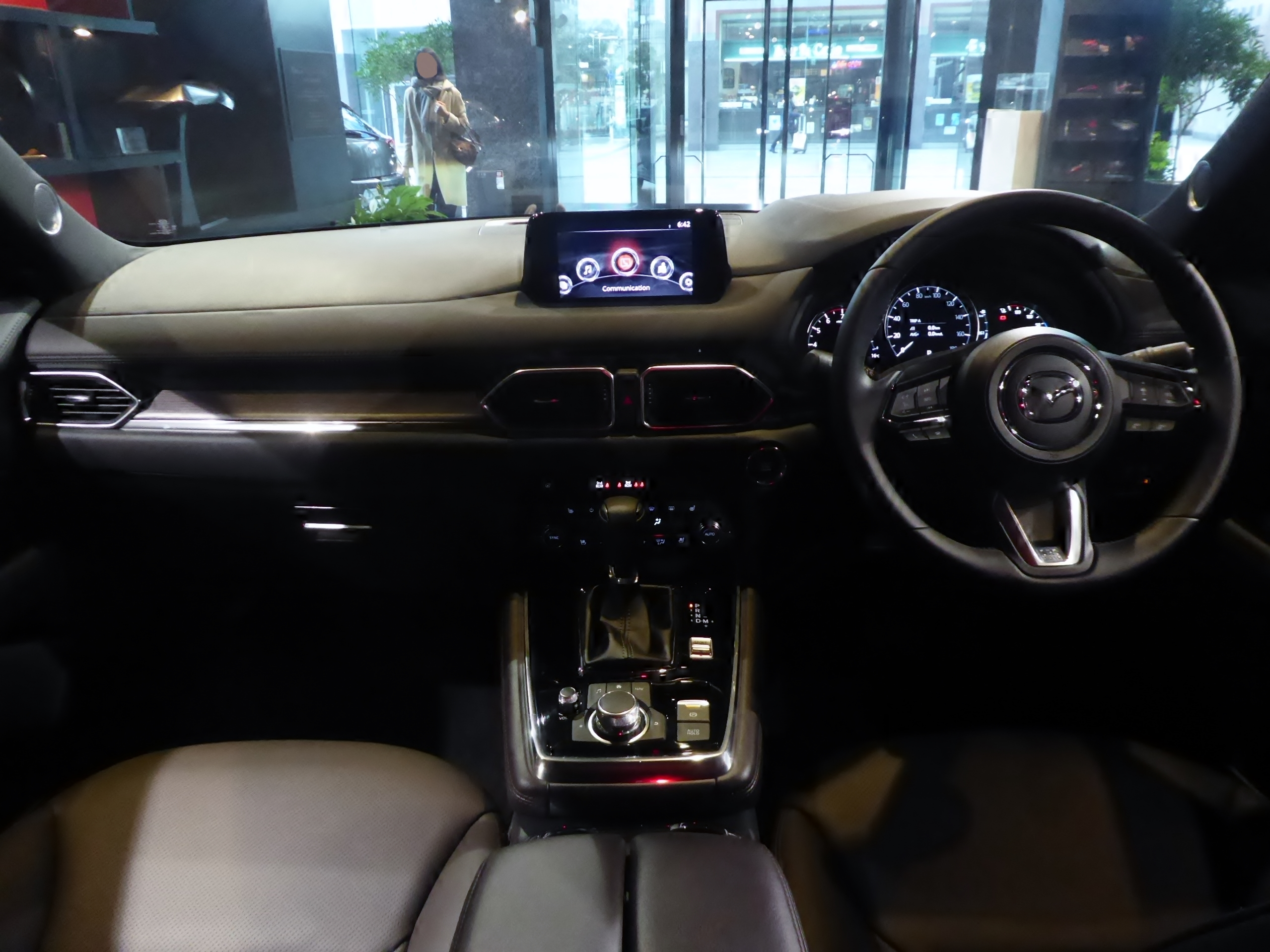 5BA-KG5P型マツダ・CX-8 25T L Package 6人乗りのインテリアを撮影。